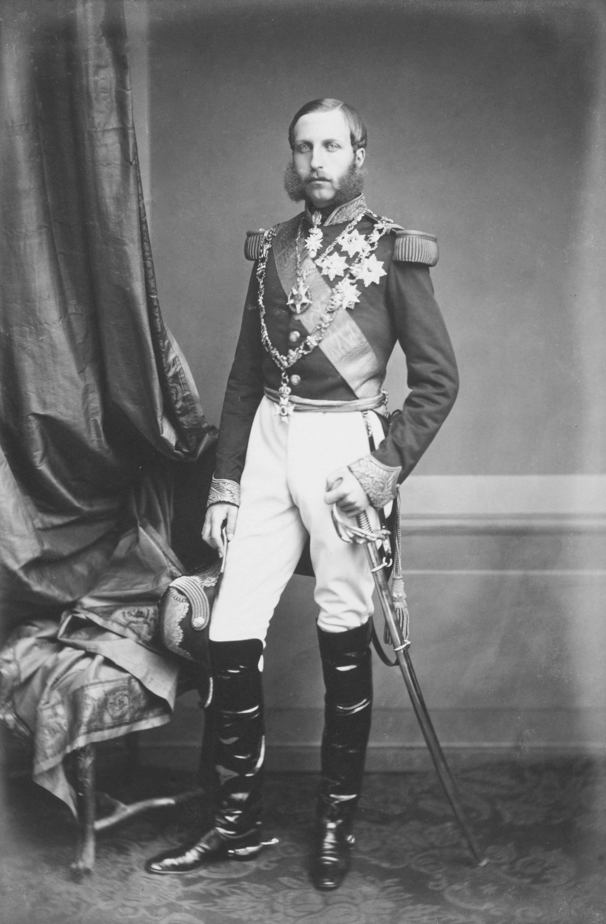 S.A.R. le prince Philippe de Belgique (1837-1905), comte de Flandre. – Il porte l’uniforme de général-major (deux étoiles sur le gland de la ceinture).